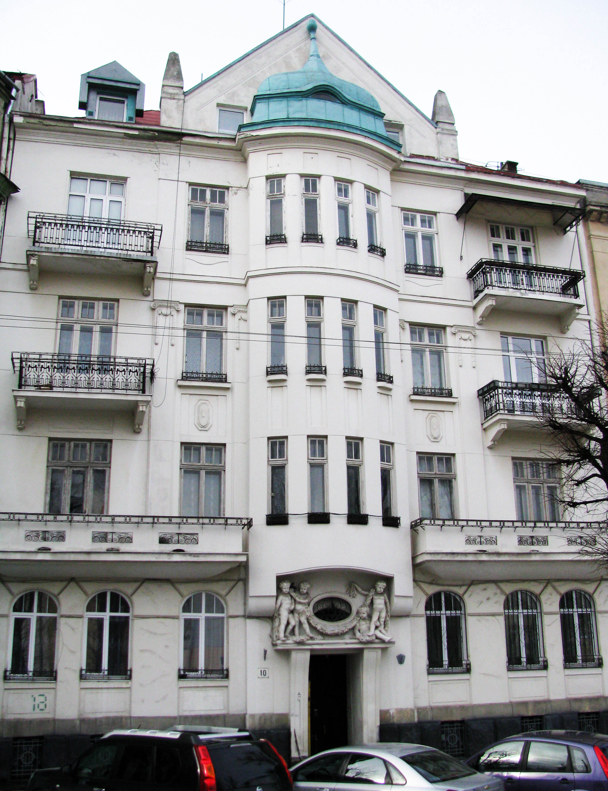 Житловий будинок по вулиці Конопницької, 10 у Львові